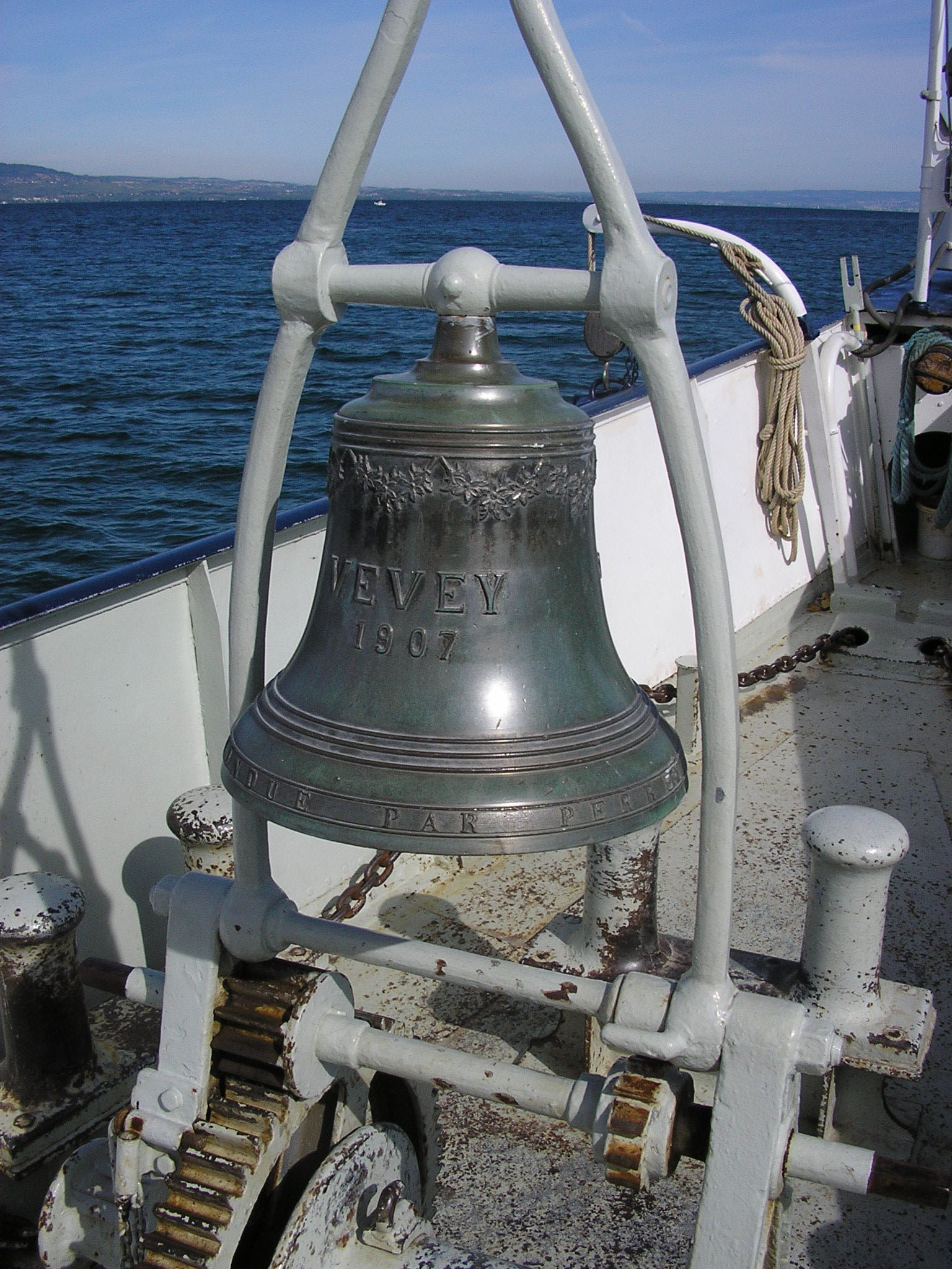 Cloche du Vevey, bateau de la Compagnie générale de navigation sur le lac Léman (CGN)